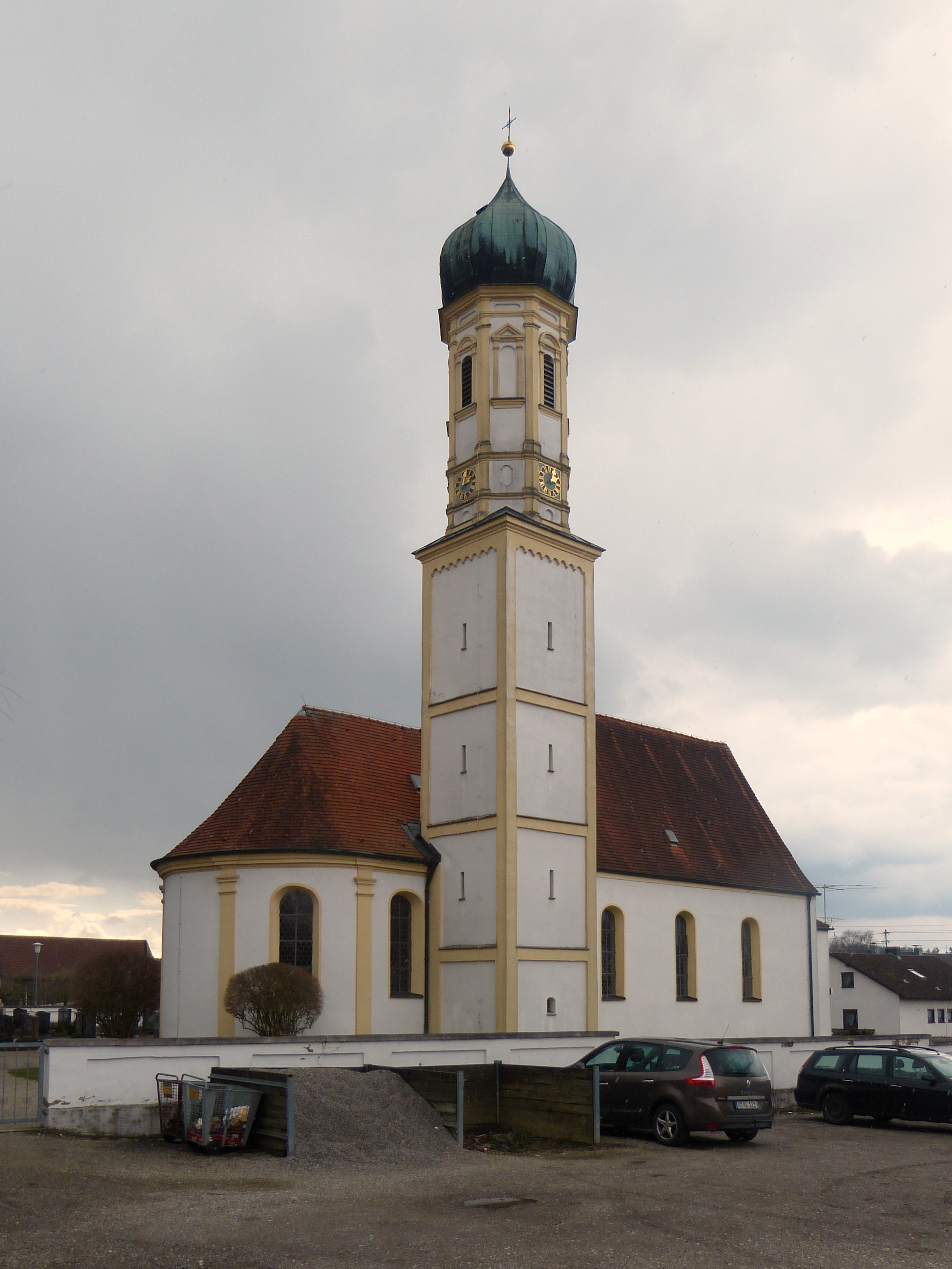 Hirblingen, Pfarrkirche St. Blasius. This is a photograph of an architectural monument.